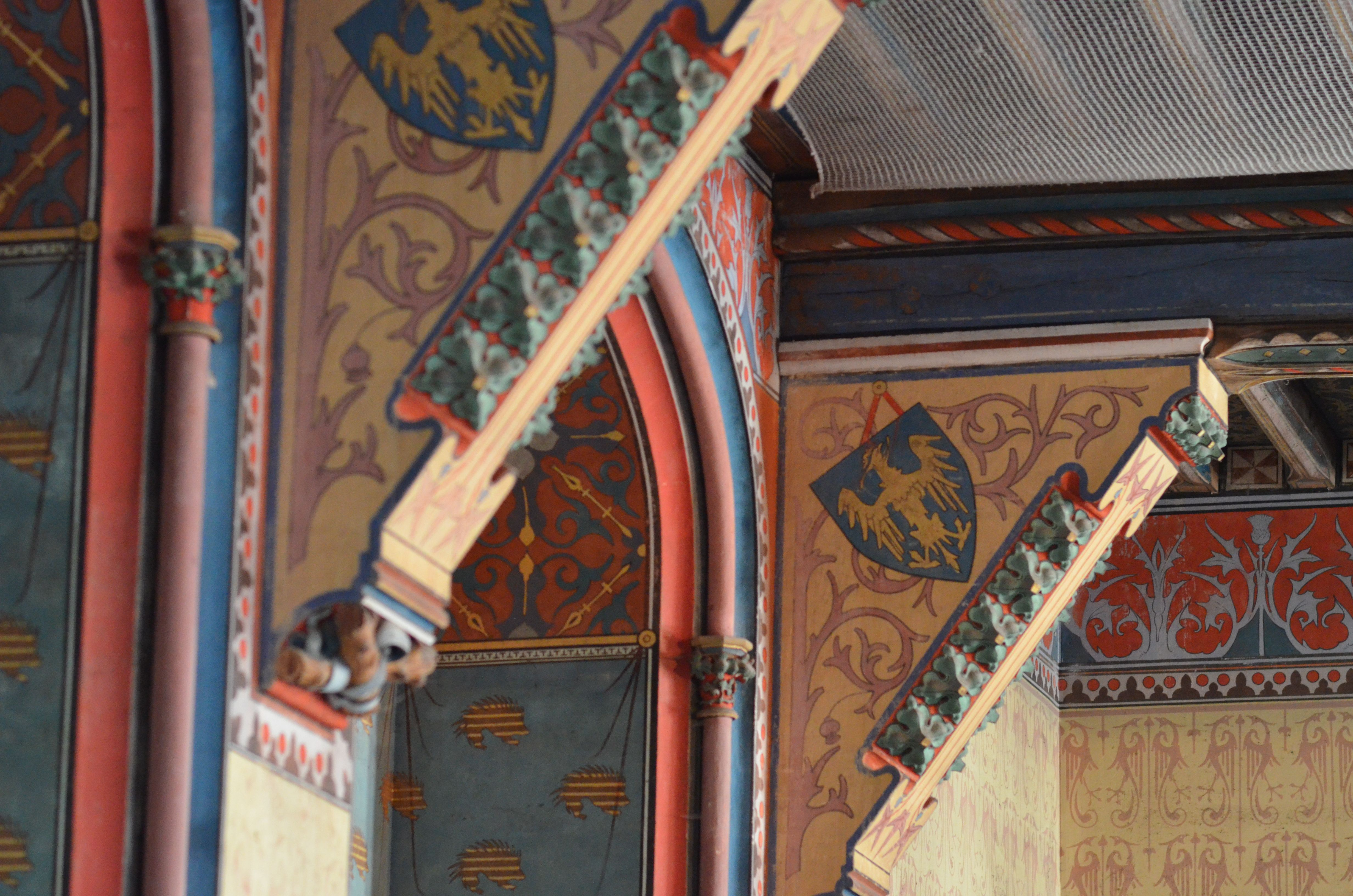 Motifs et couleurs des décorations d'intérieur du château de Pierrefonds .